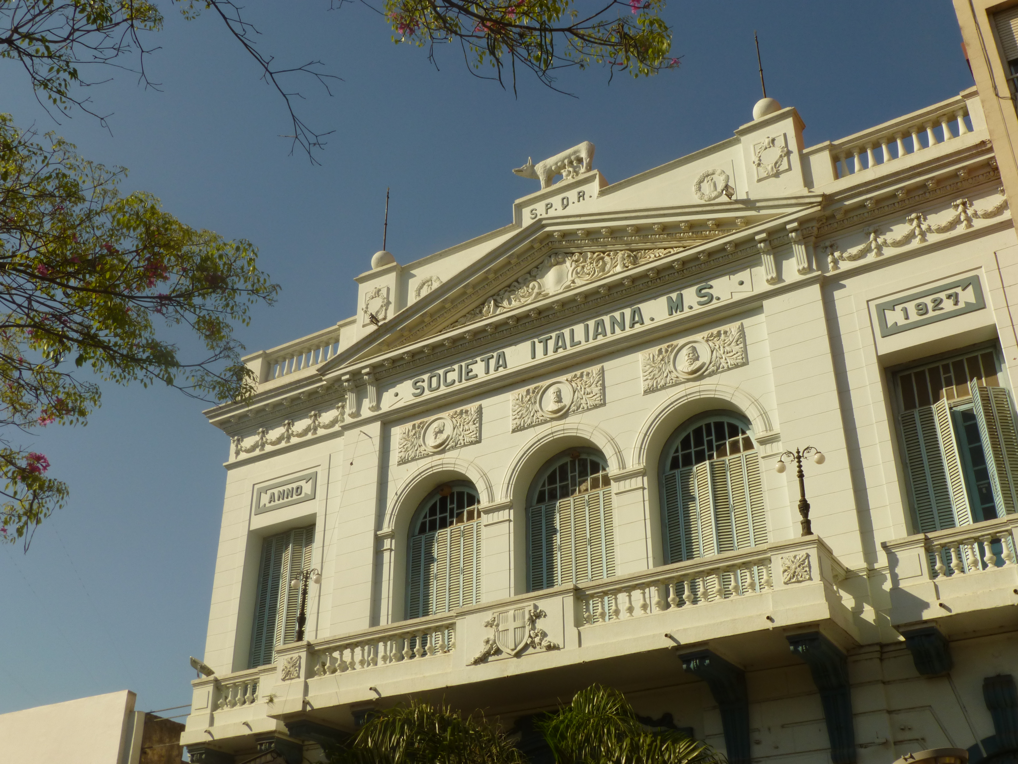 Sociedad Italiana de Socorros Mutuos de la ciudad de Posadas, en Misiones.